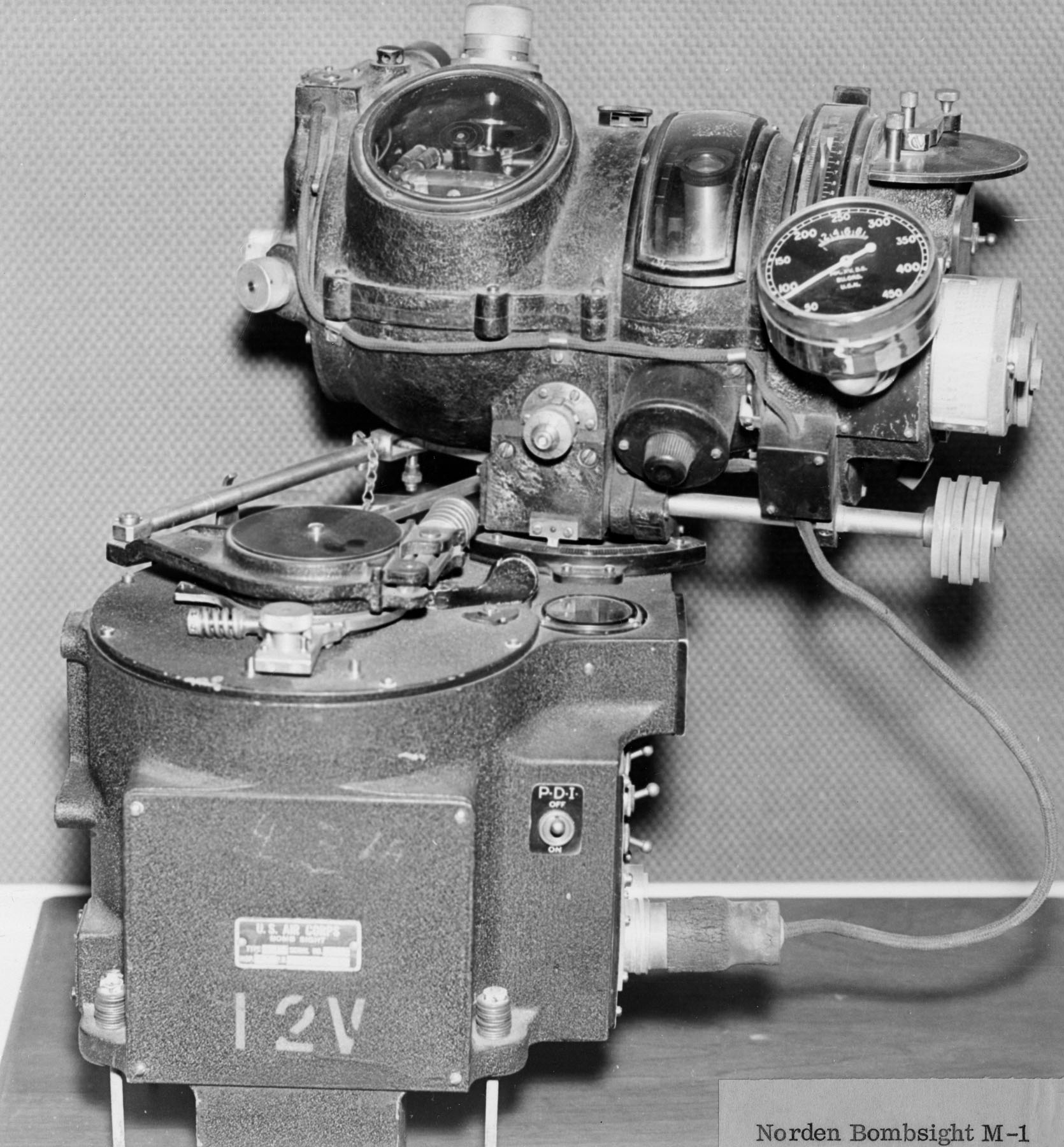 Norden M1 bombsight